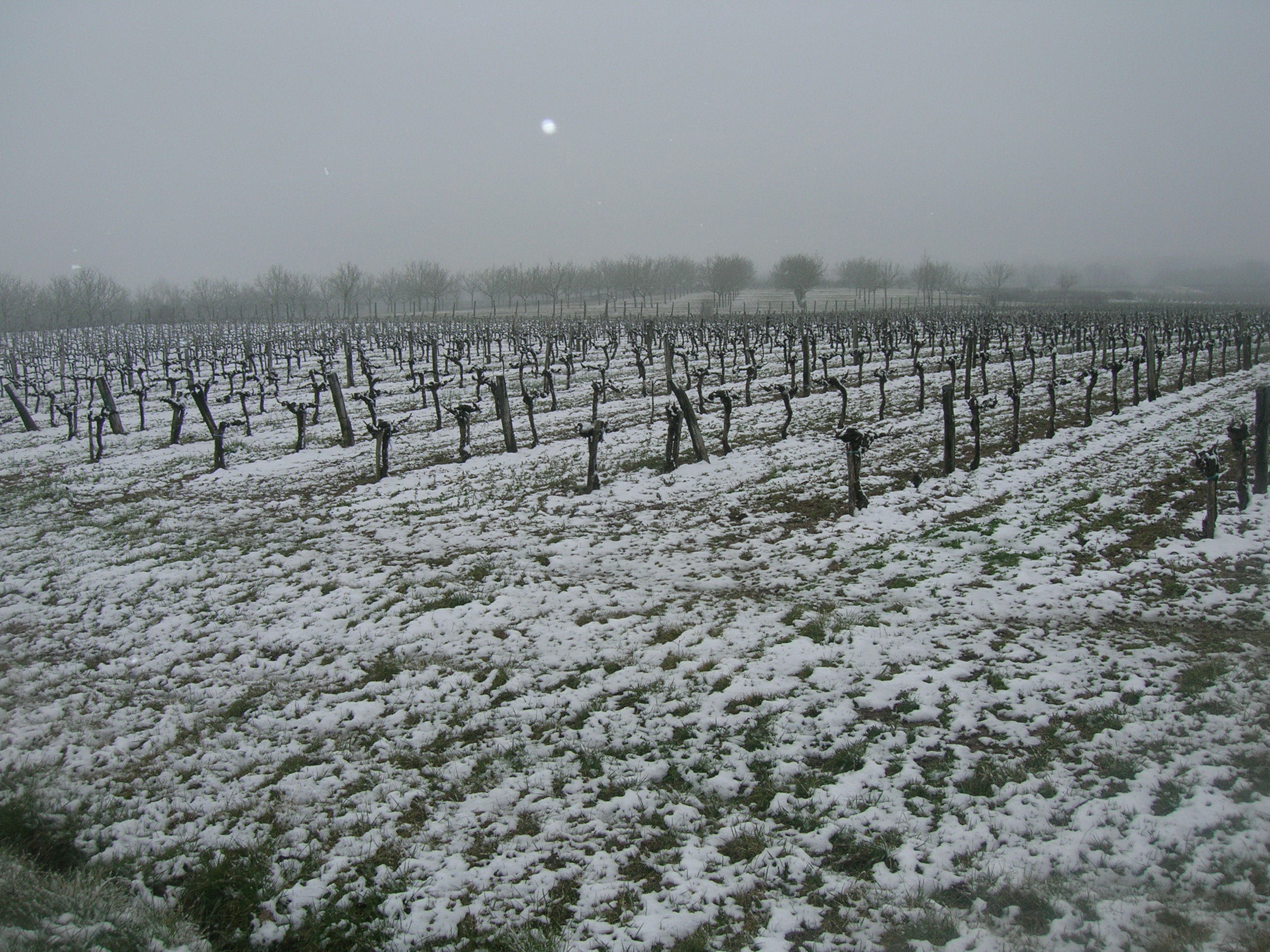 Beschneiter Weingarten in Cestayrols - Weinbaugebiet Gaillac